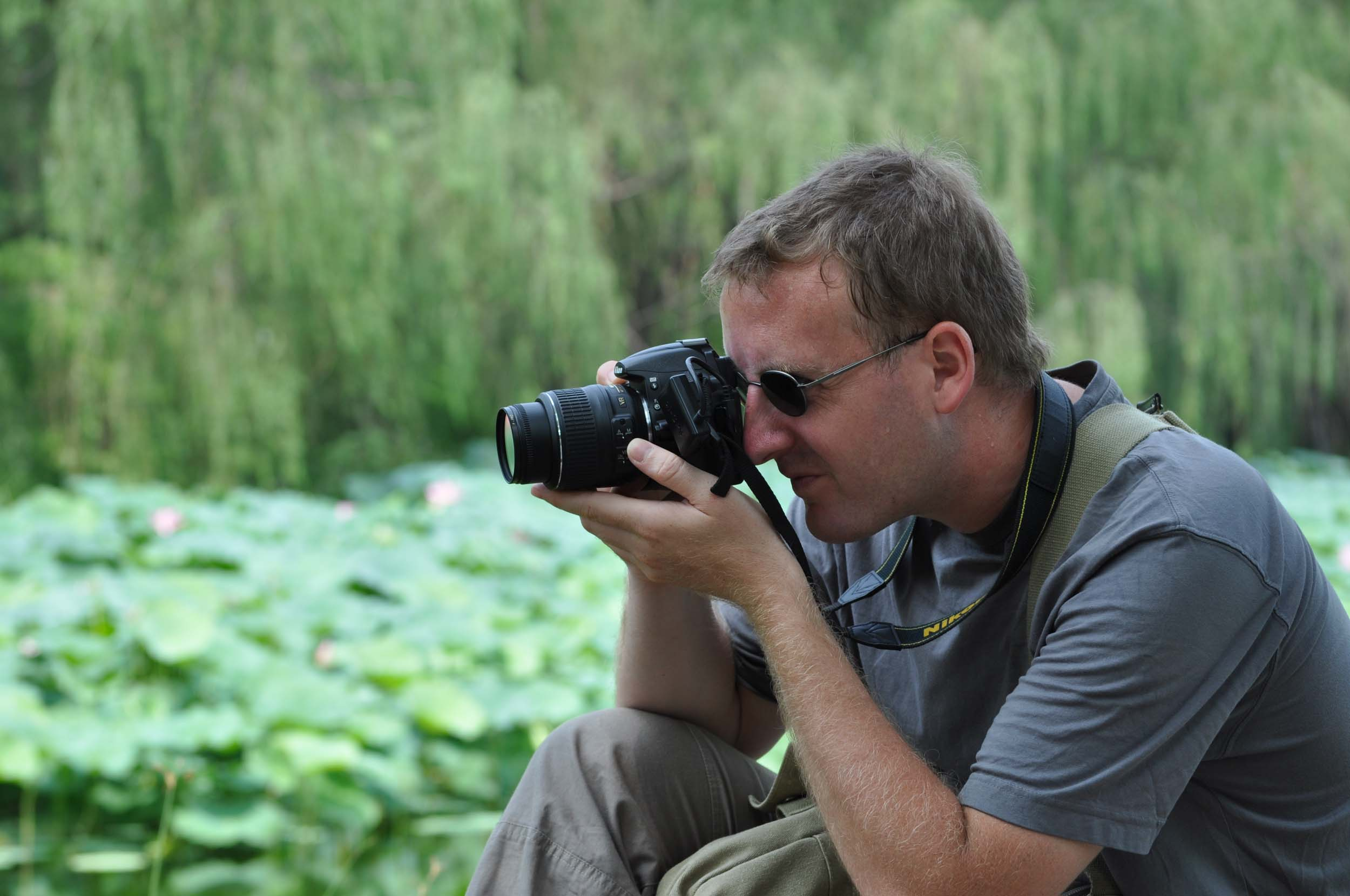 Michael Moll bei seiner Arbeit und seinem Hobby.